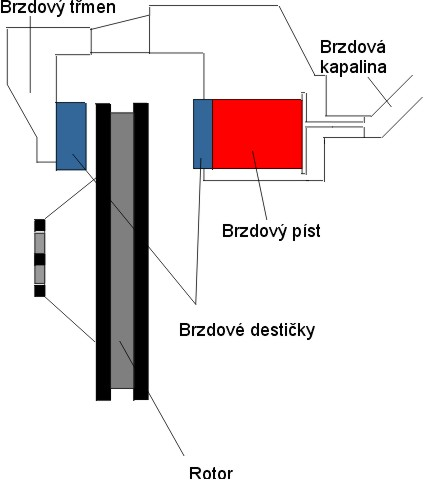 Schéma kotoučové brzdy